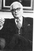 尾上清さん晩年